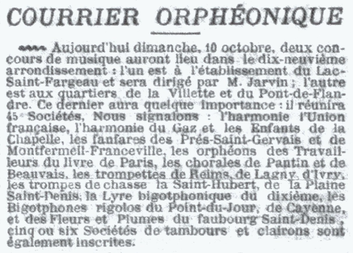 Annonce de deux concours musicaux dans Le Petit Parisien, début de la rubrique Courrier orphéonique, page 3, 3ème colonne.